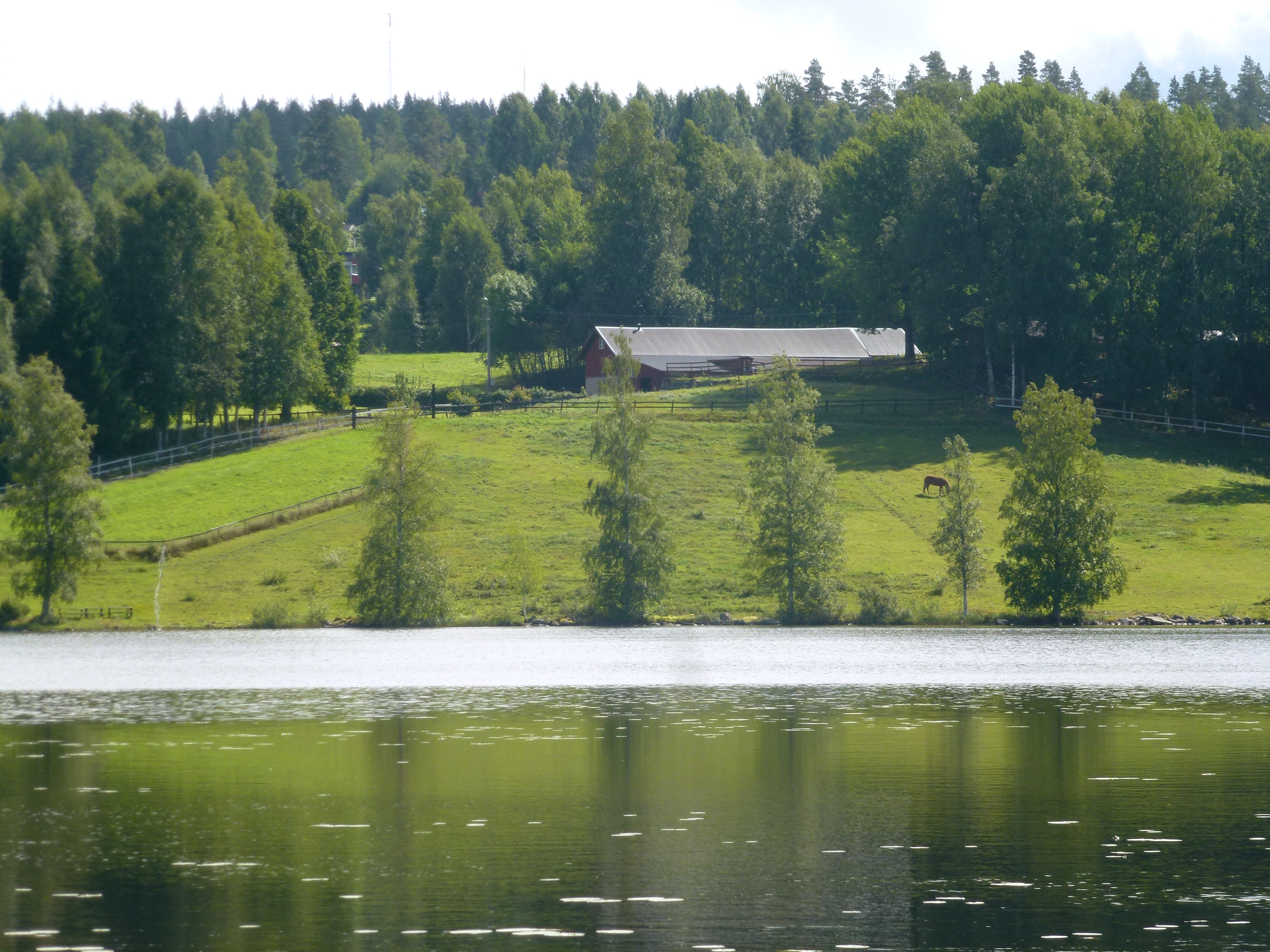 Burtjärnen med småorten Burens i bakgrunden